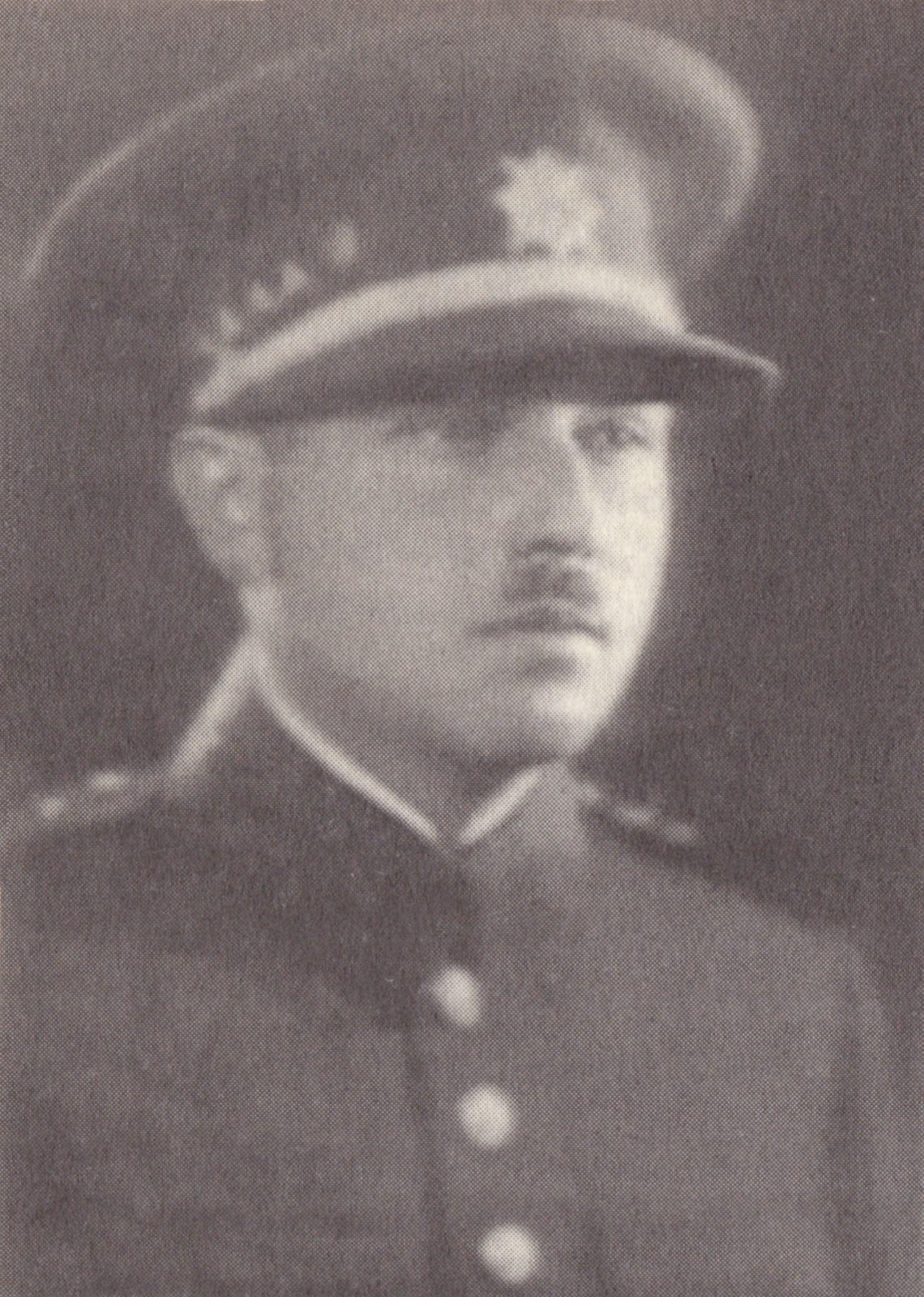 Štěpán Adler (* 1896, Rajhrad – 1942, Berlín) - československý voják, zpravodajský důstojník a protinacistický bojovník. V ústředním vedení vojenské ilegální odbojové organizace Obrana národa působil jako přednosta 5. oddělení zodpovědného za udržování radiového spojení v protektorátu i se zahraničím. Koncem roku 1939 byl zatčen gestapem, vězněn na růzých místech (na Pankráci v Praze, v Berlíně, v Gollnowě u Štětína a poté znovu v Berlíně ve věznici Moabit). Koncem roku 1941 byl odsouzen k trestu smrti za velezradu a spolčení s nepřítelem. Popraven 7. srpna 1942 v Berlíně-Plötzensee. Foto před rokem 1940.